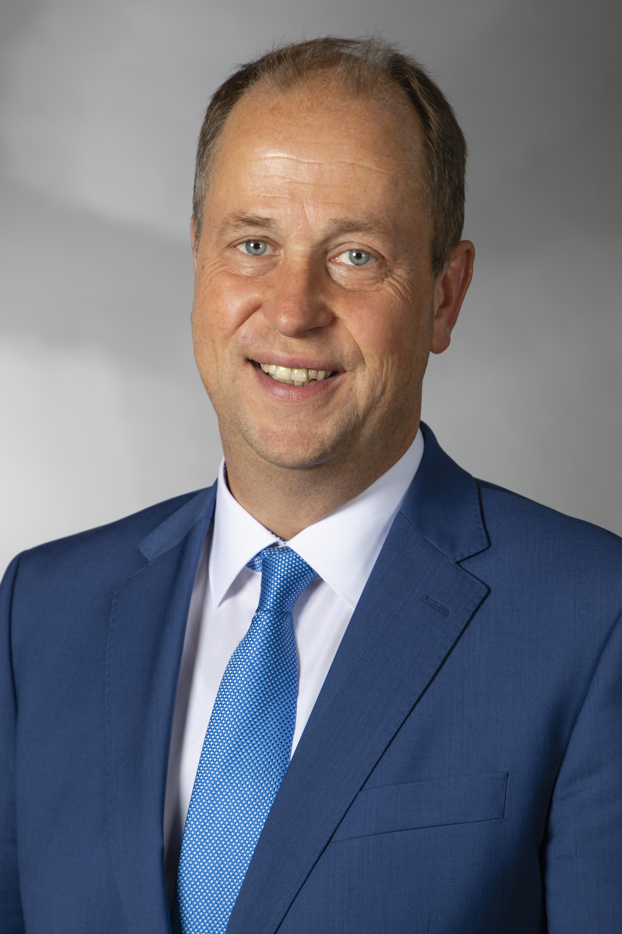 Joachim Stamp Wikipedia-Landtagsprojekt NRW 2019 22 March 2019 in DüsseldorfThis file was taken during the project “Landtag Nordrhein-Westfalen 2019” (German). Organisation: Olaf KosinskyPhotography: Foto-AG Gymnasium Melle: Karsten Mosebach, Anna Borchert, Lara Diekmann, Marieke Eckjans, Neele Grieger, Charlotte Meyran, Carolin Möller, Leoni Potts, Alicia Wulbusch Usage information If you need more information how to use this file, please send an email to . The making of this document was supported by Skillshare. Personality rights warningAlthough this work is freely licensed or in the public domain, the person(s) shown may have rights that legally restrict certain re-uses unless those depicted consent to such uses. In these cases, a model release or other evidence of consent could protect you from infringement claims.